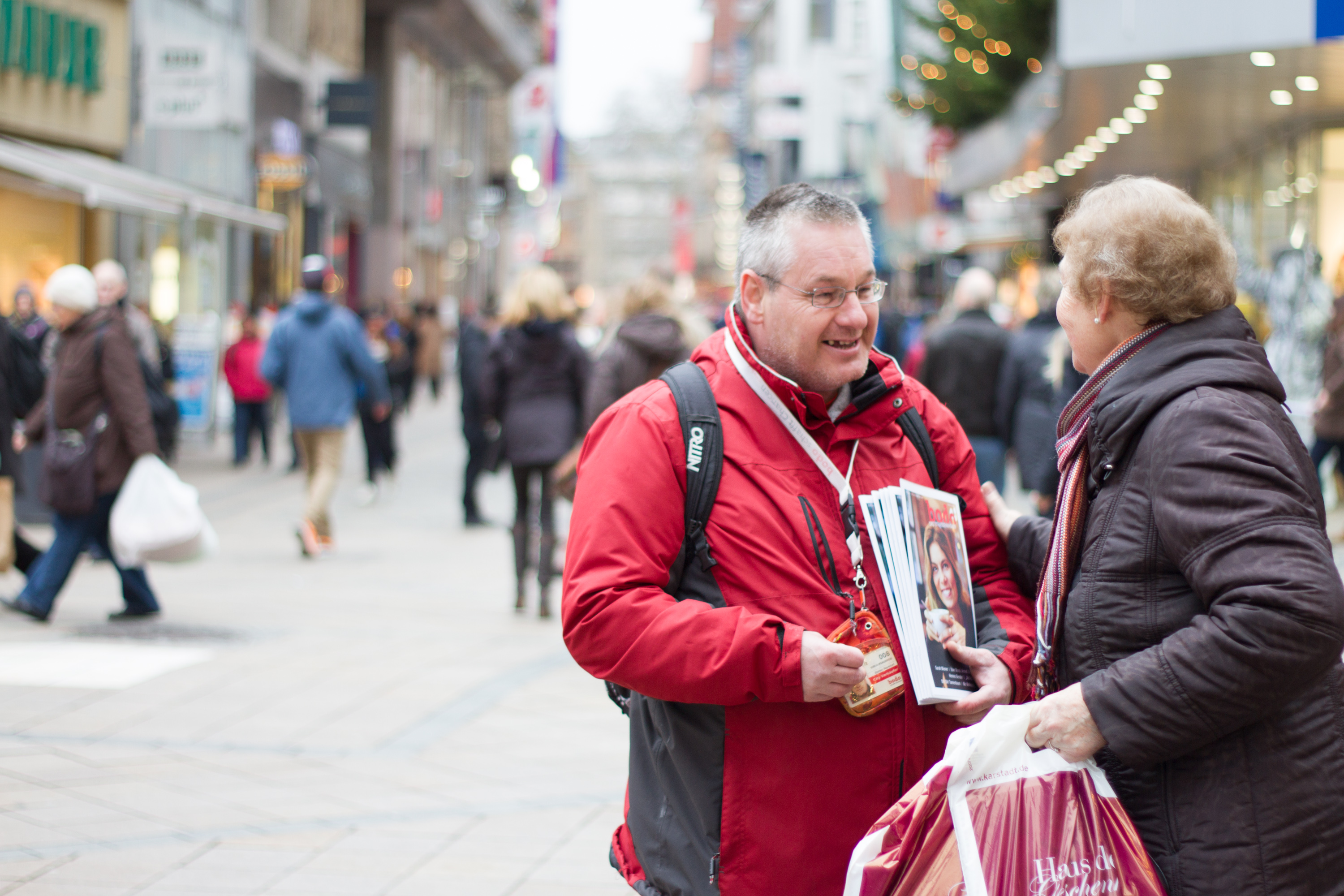 Verkauf des Straßenmagazins bodo auf dem Westenhellweg in Dortmund.